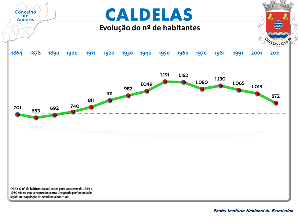 Censo 2011